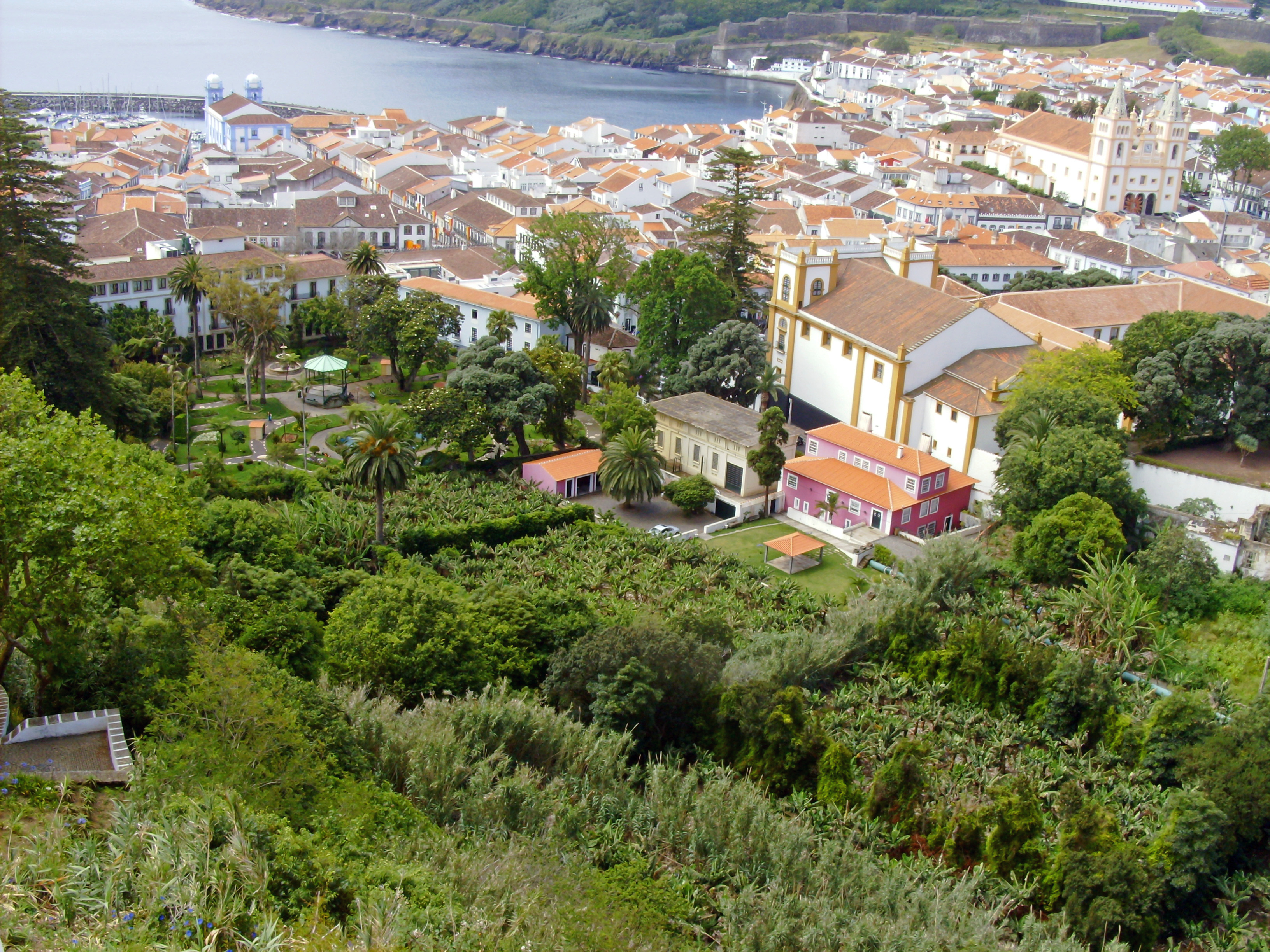 Jardim Duque da Terceira, Angra do Heroísmo, Ilha Terceira, Açores.